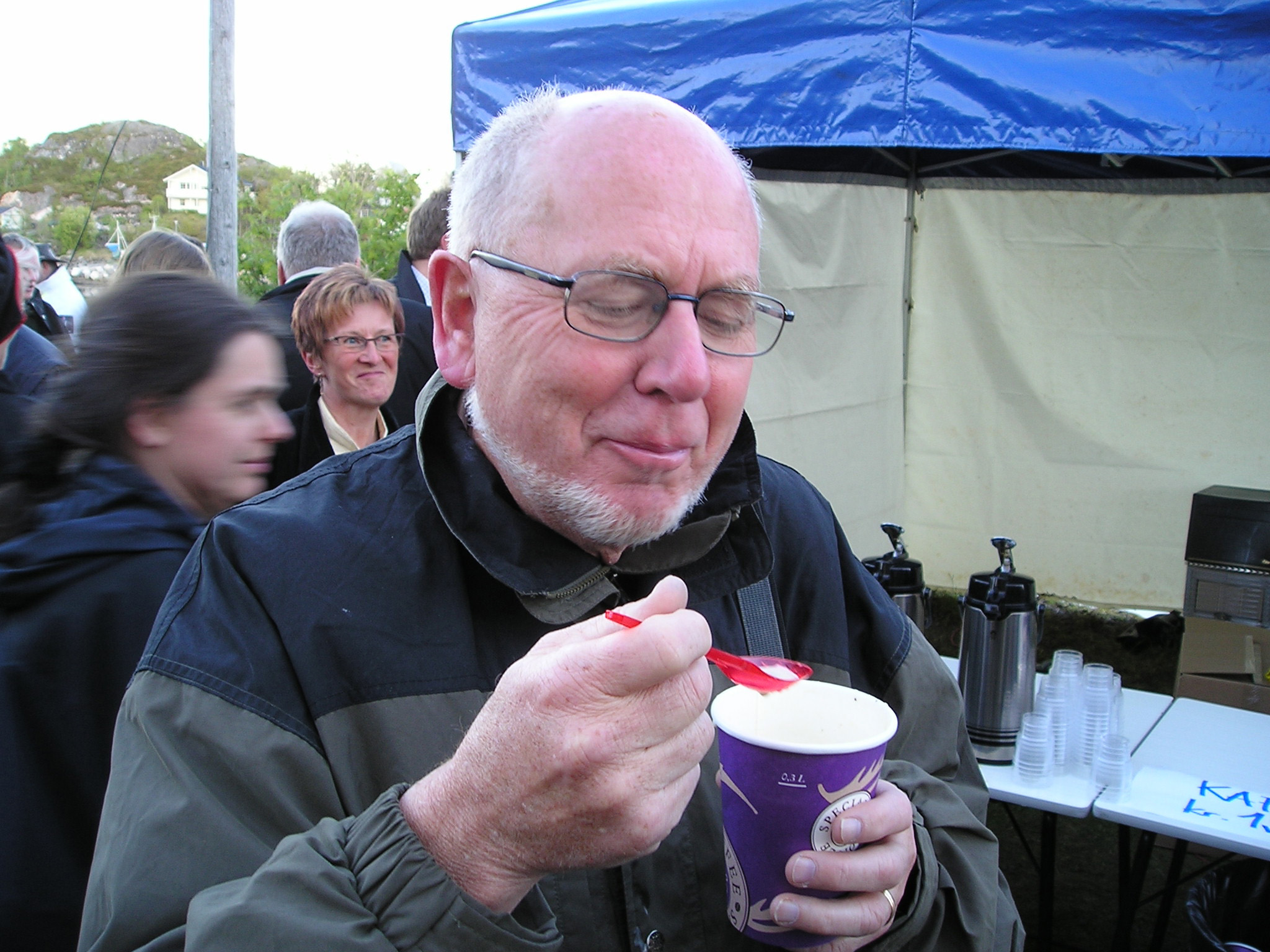 Thor Bjarne Bore